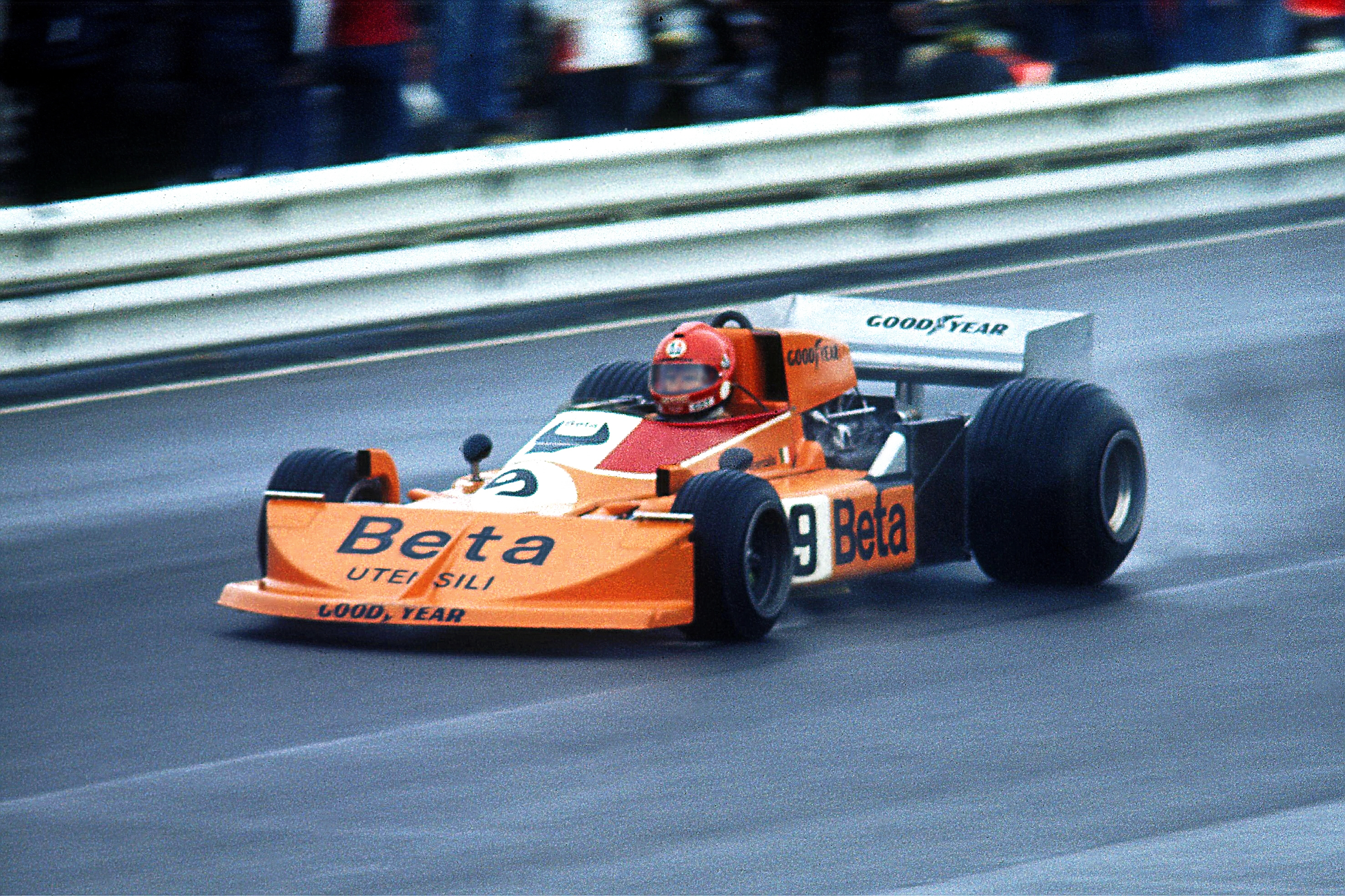 Vittorio Brambilla im March-Ford 761. Am 31.07.1976 beim Training zum GP von Deutschland auf der Zielgeraden des Nürburgrings.